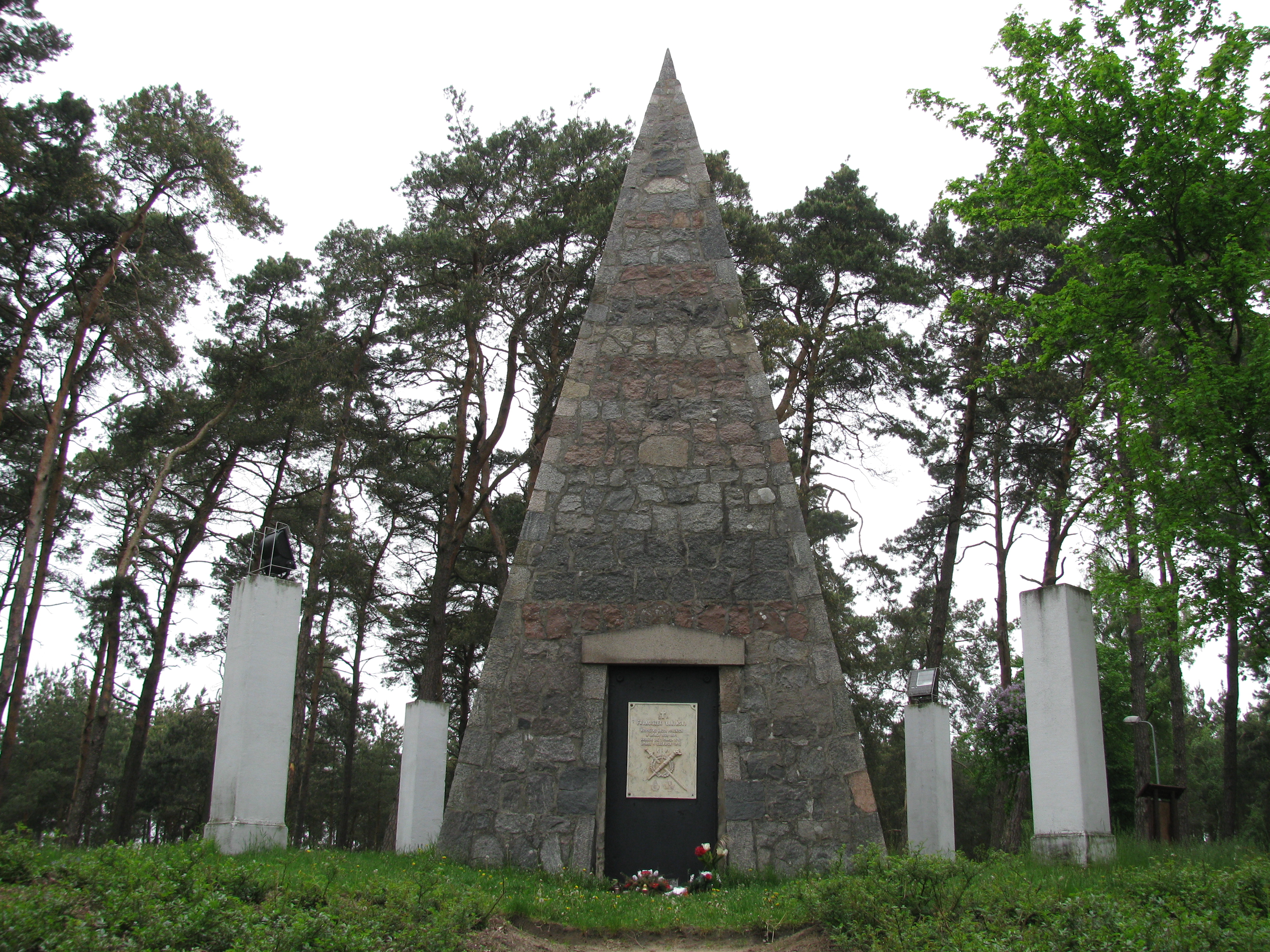 Łaziska - grobowiec Franciszka Łakińskiego z kolumną z 1. połowy XIX w